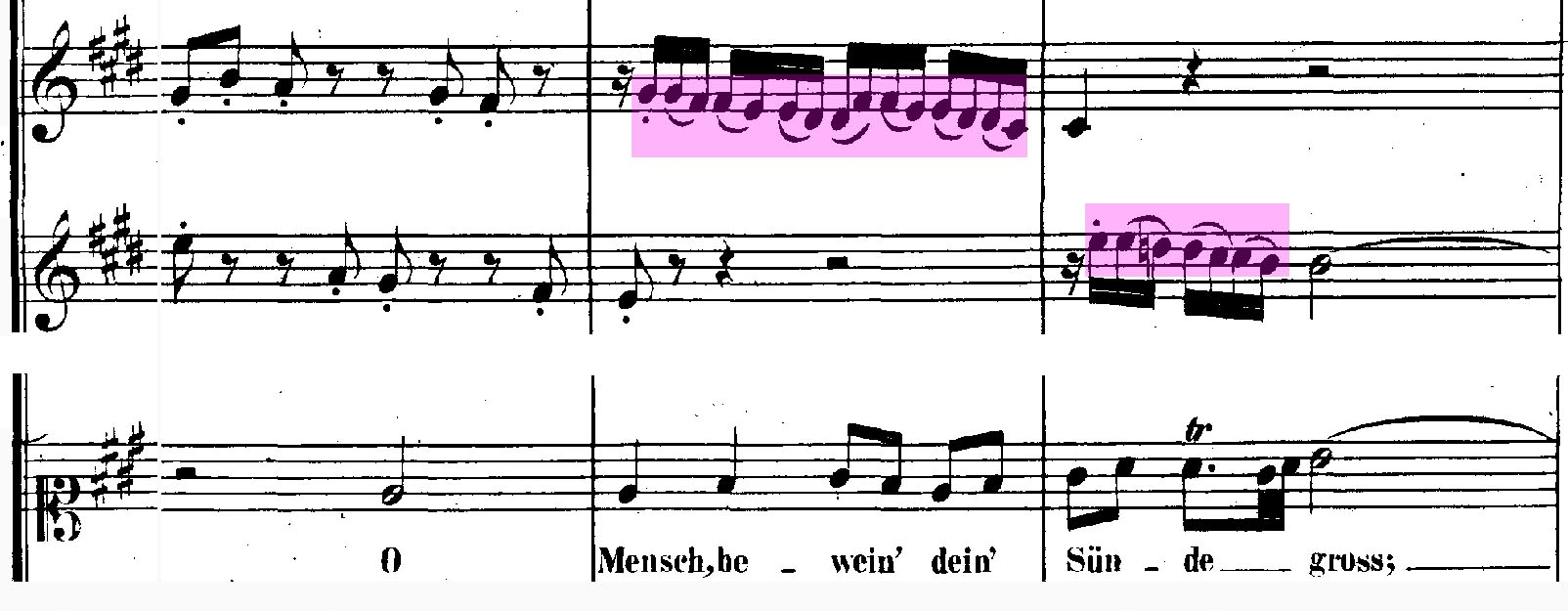 Seufzerketten im Chor "O Mensch bewein dein Sünde groß" aus Bach: Matthäuspassion